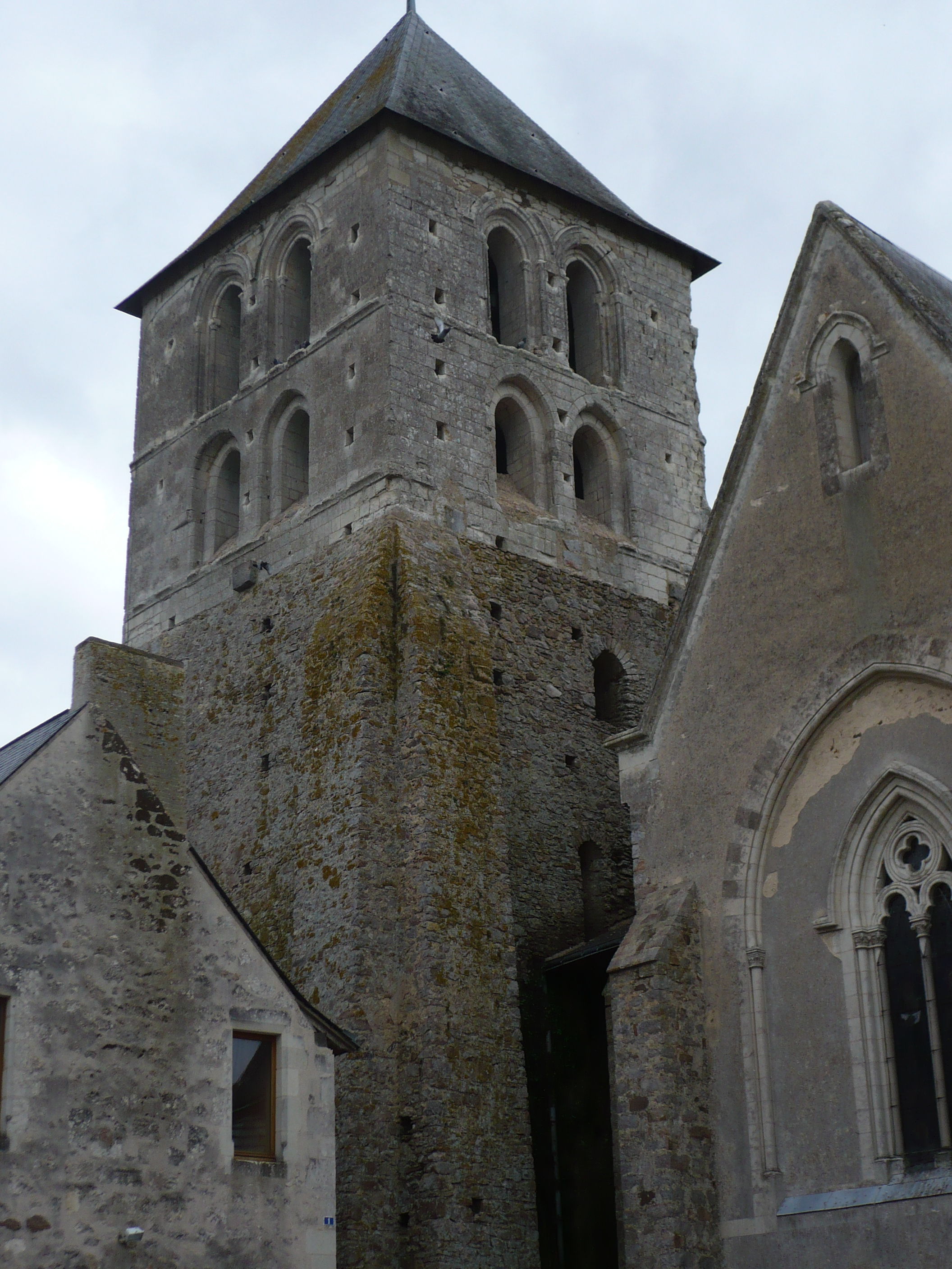 Cheviré - Eglise .